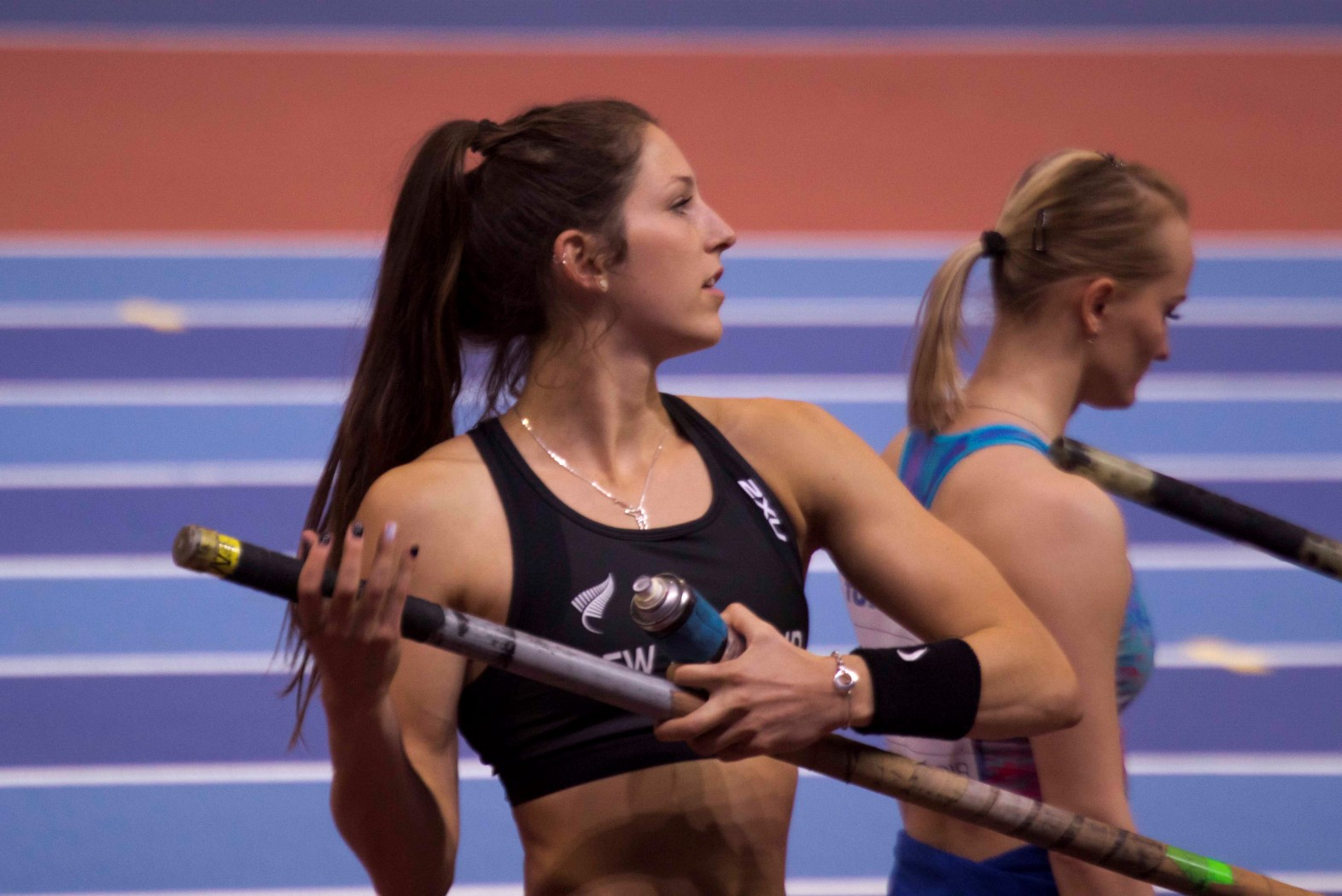 WK3B0118 polsstok dames mccartney